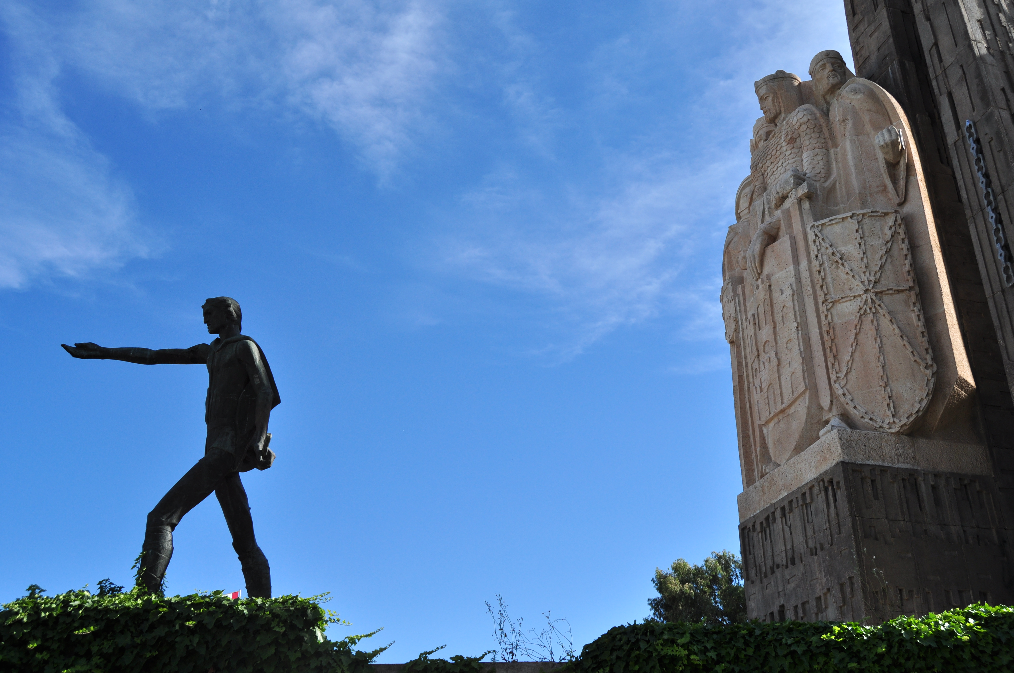 Monumento a la batalla de las Navas de Tolosa, La Carolina, Spain.